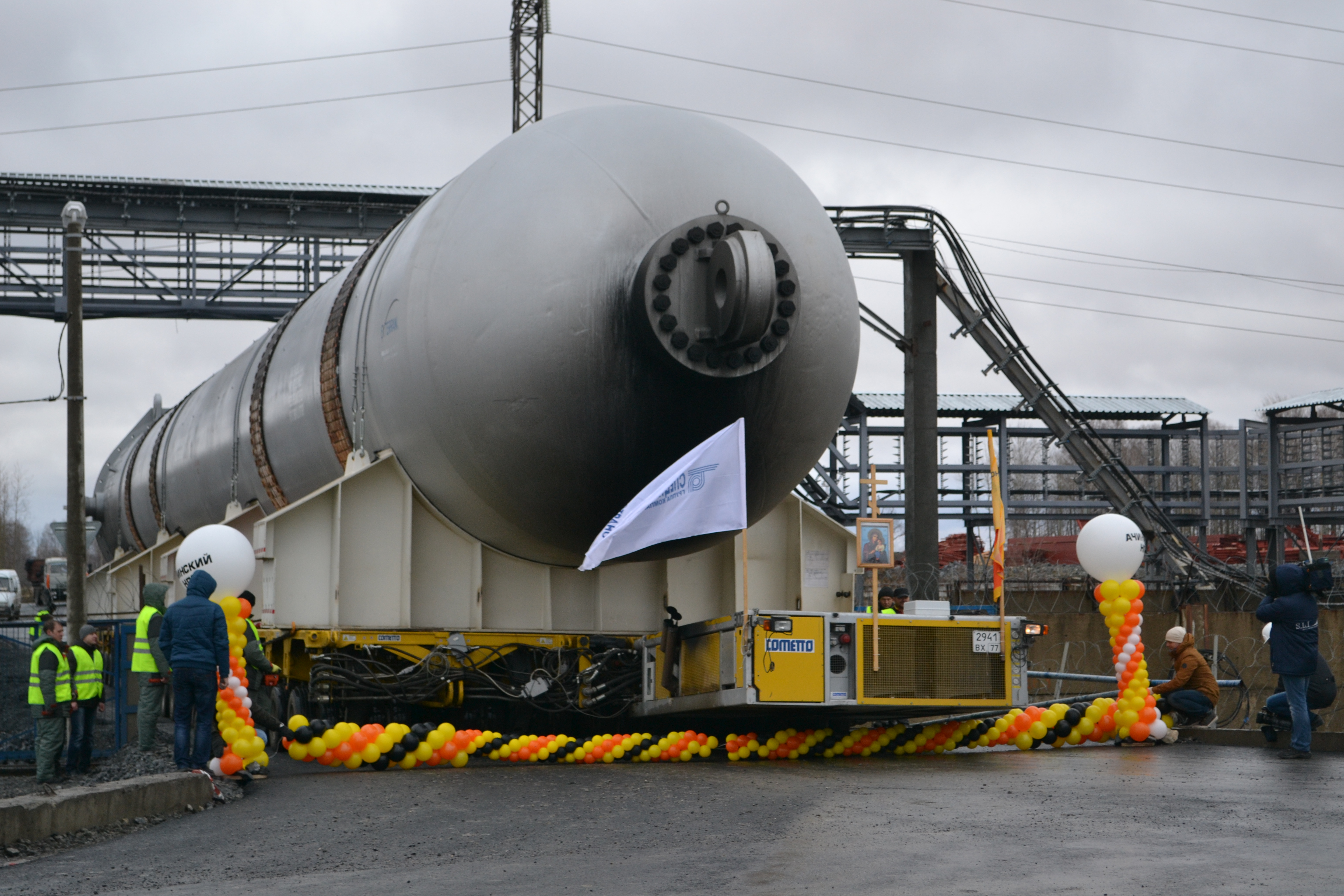 Реактор гидрокрекинга весом1306 тонн